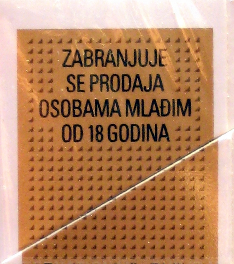 Natpis upozorenja na kutiji cigareta za hrvatsko tržište u 2008. godini